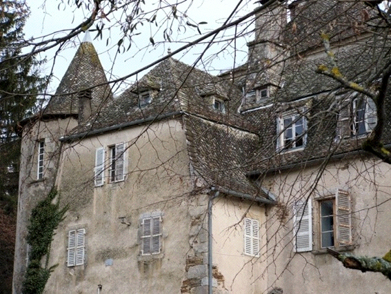 Chateau de Fargues à Vitrac (15) France. Vue de côté.